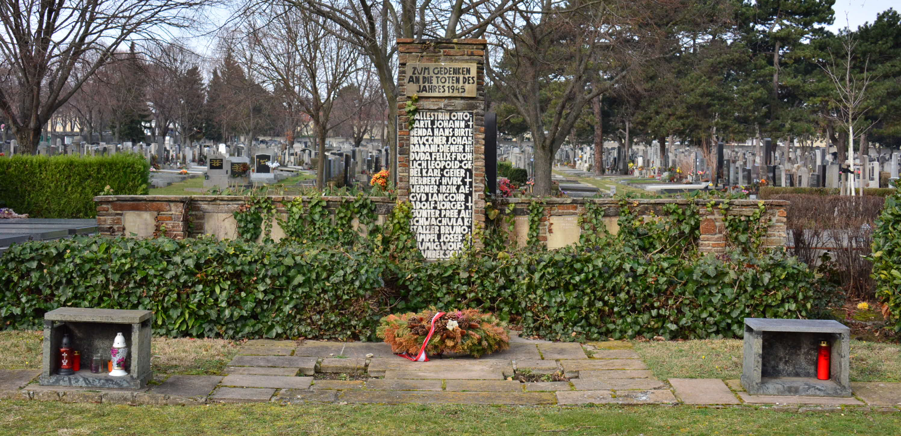 Grabanlage für zivile Kriegsopfer des Jahres 1945, die ursprünglich auf dem Areal des Pflegeheimes Lainz beigesetzt und später hierher verlegt wurden.